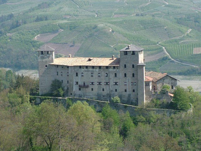 Castel Cles, visto da Cles via Cassina